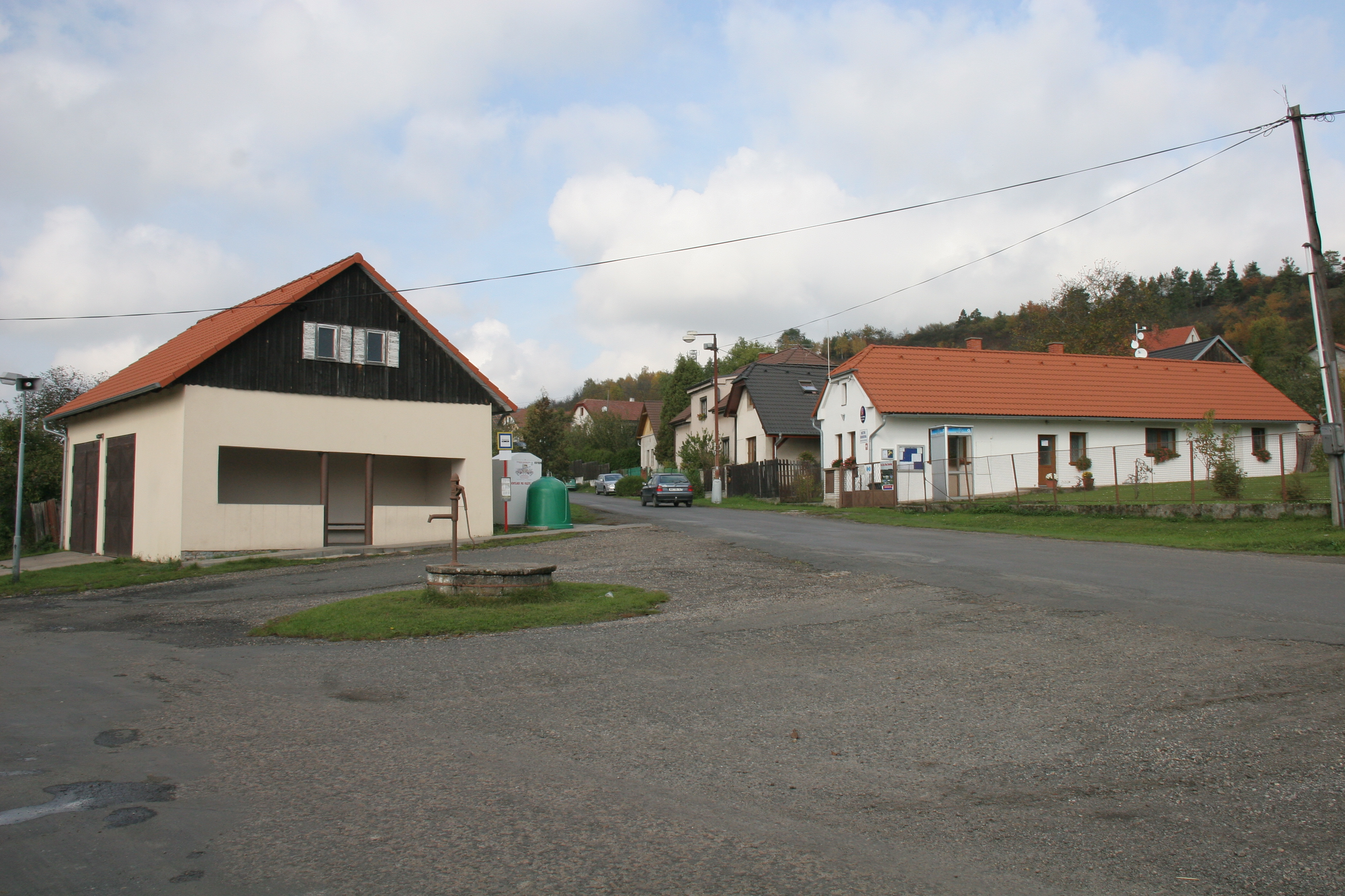 Hradčany obecní úřad